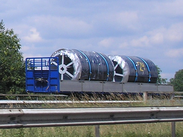 Rollpave - tarmac on a roll. Two rolls (17.000 kg each) on a truck. Location: Hengelo, Overijssel, Netherlands Keywords: Rollpave, tarmac, rollable nl: Rollpave op- en afrolbaar asfalt. Twee haspels op een oplegger. Locatie: Hengelo, proefvak op de A35. Trefwoorden: Rollpave, asfalt, afrolbaar, oprolbaar